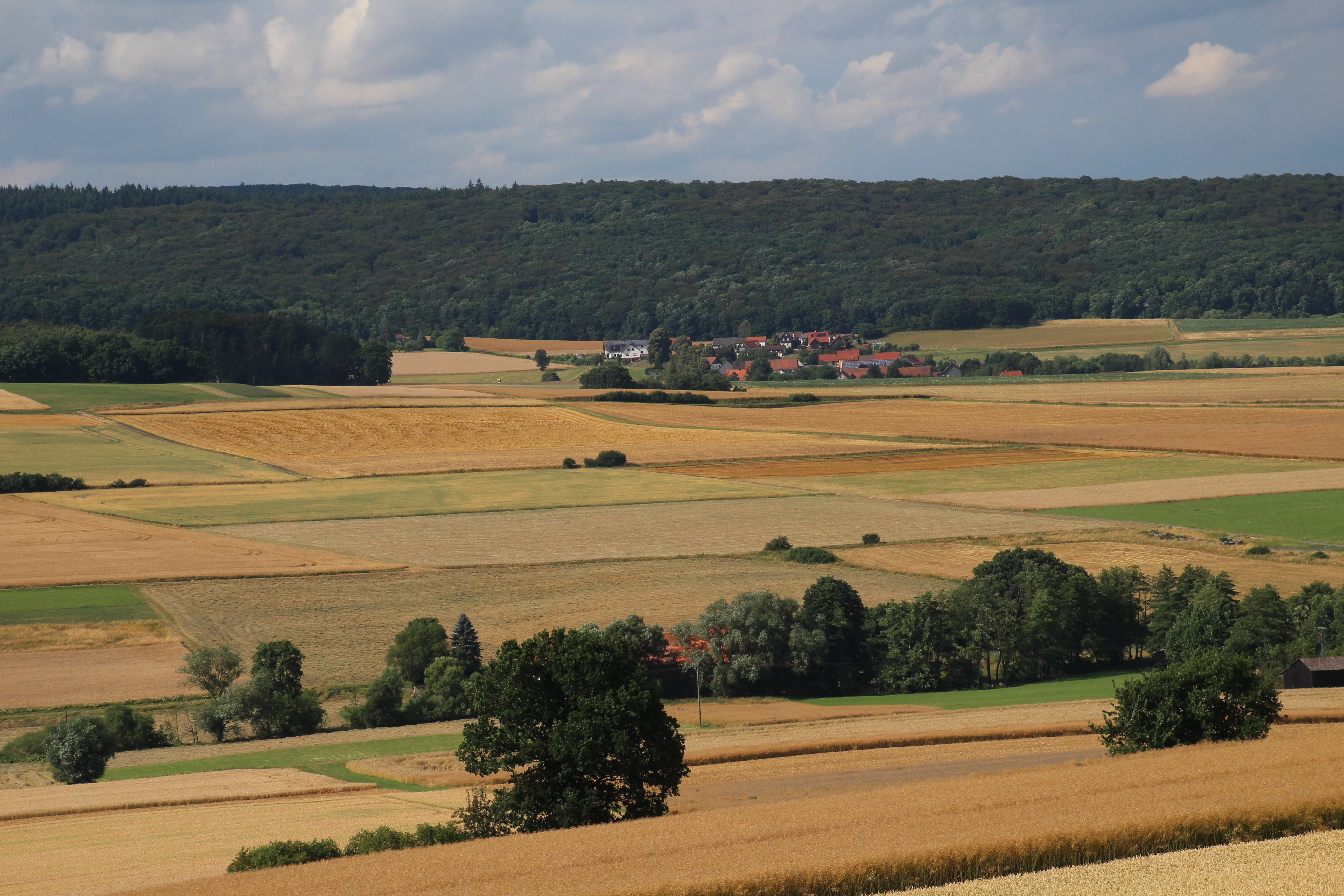 Siehe Foto, Dateiname u. ggf. Geo-Koordinaten